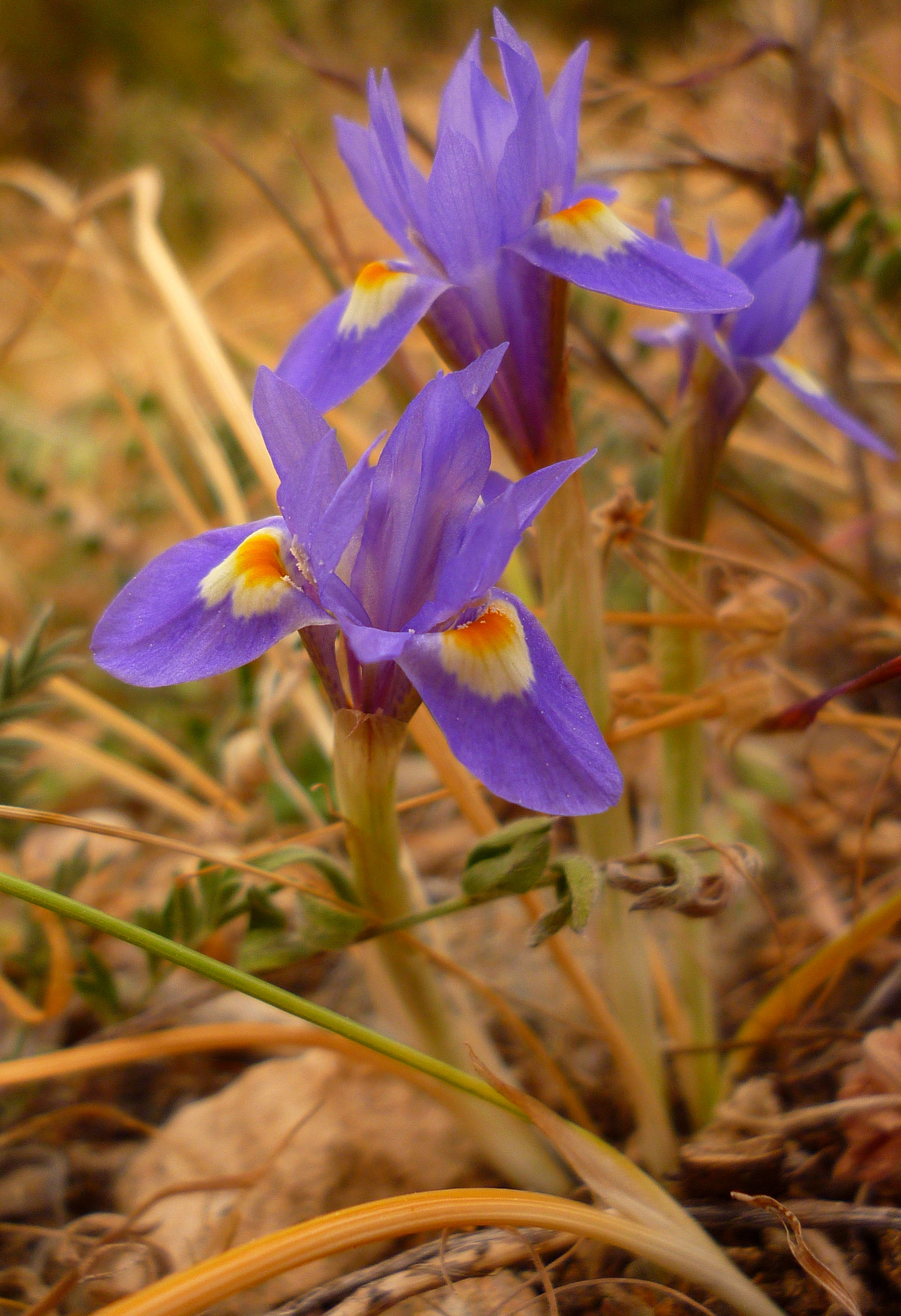 Gynandriris sisyrinchium en el Monte Atalaya de Cartagena, España.